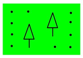 Esou gett en Dännebësch op enger Landkaart duergestallt.